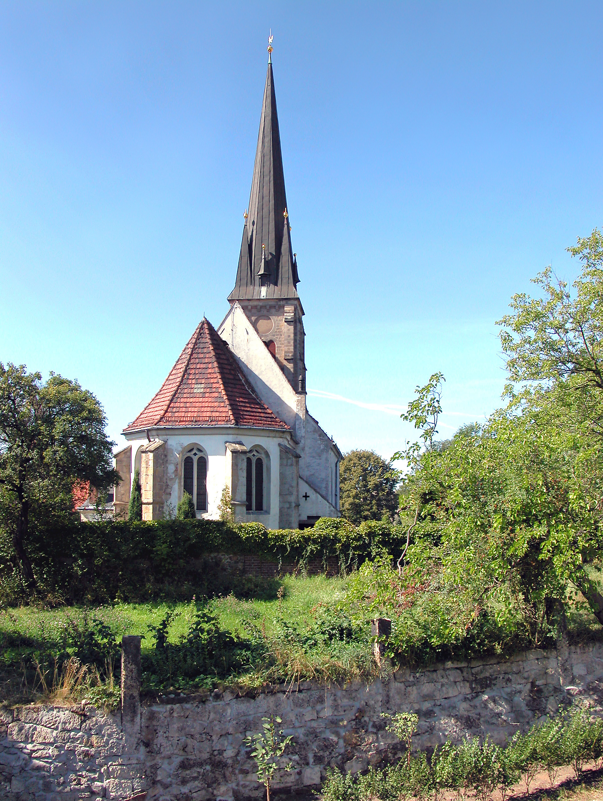 05.09.2004 01819 Friedrichswalde 34 (Bahretal): Dorfkirche Friedrichswalde von Nordosten (GMP: 50.900399,13.906553). Der heutige Kirchenbau geht bis auf das Jahr 1647 zurück. In der Saalkirche aus der Zeit um 1500 befinden sich Teile aus einem romanischen Vorgängerbaus, zu denen u.a. vermutlich der Triumphbogen zwischen Chor und Schiff gehört. Die Maßwerkfenster und der langgestreckte Chor sind jedoch der Mitte des 16. Jahrhunderts zuzuordnen. Sicht von Osten. [DSCN5019.TIF]20040905200DR.JPG(c)Blobelt